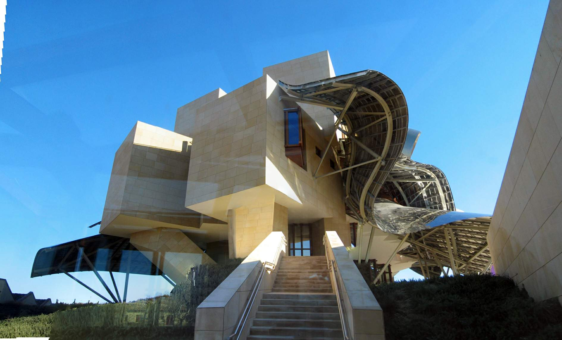 Bodegas Marques de Riscal